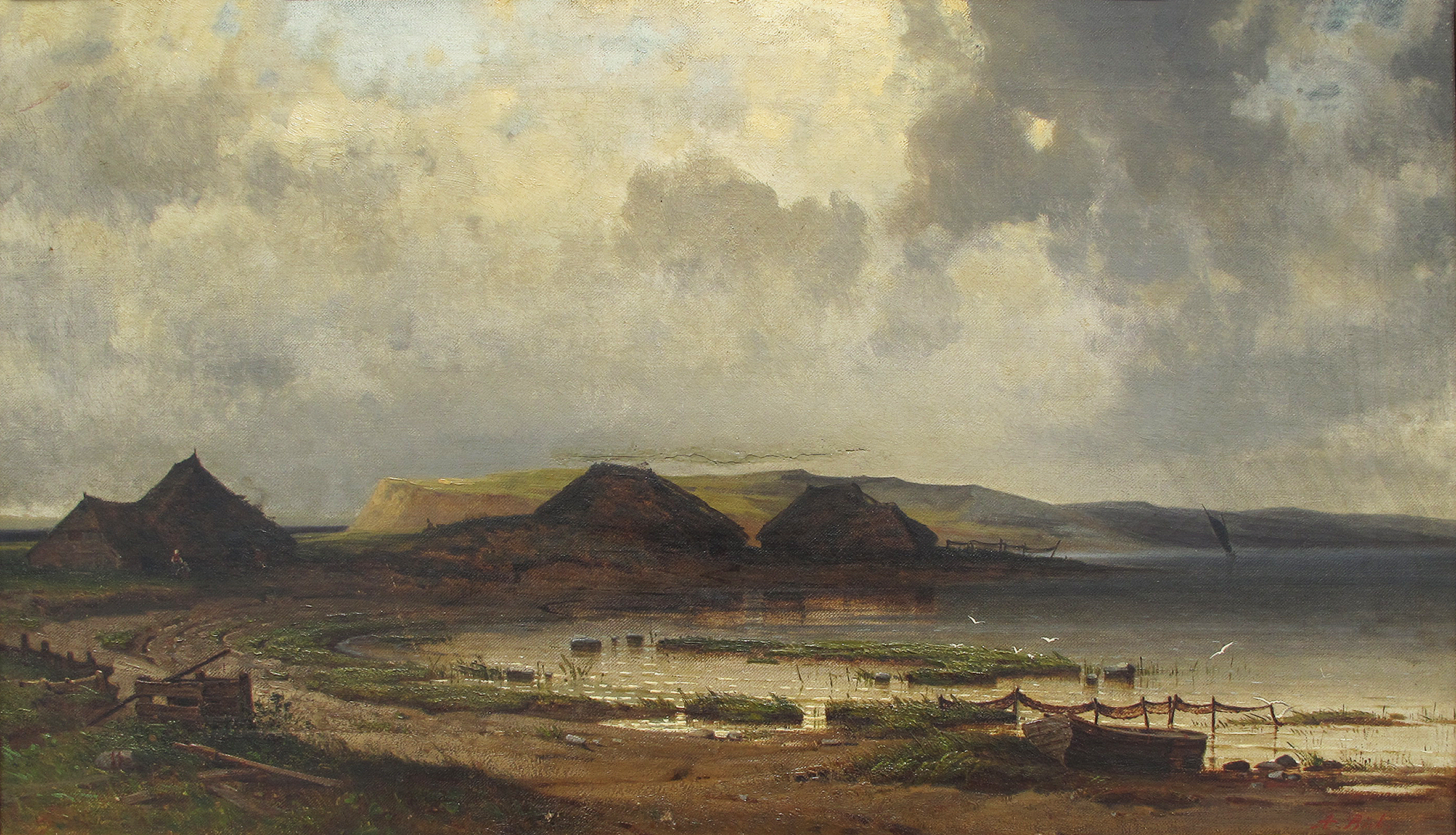 Darstellung eines Fischerdorfes, wahrscheinlich auf der Insel Rügen (Mönchgut)